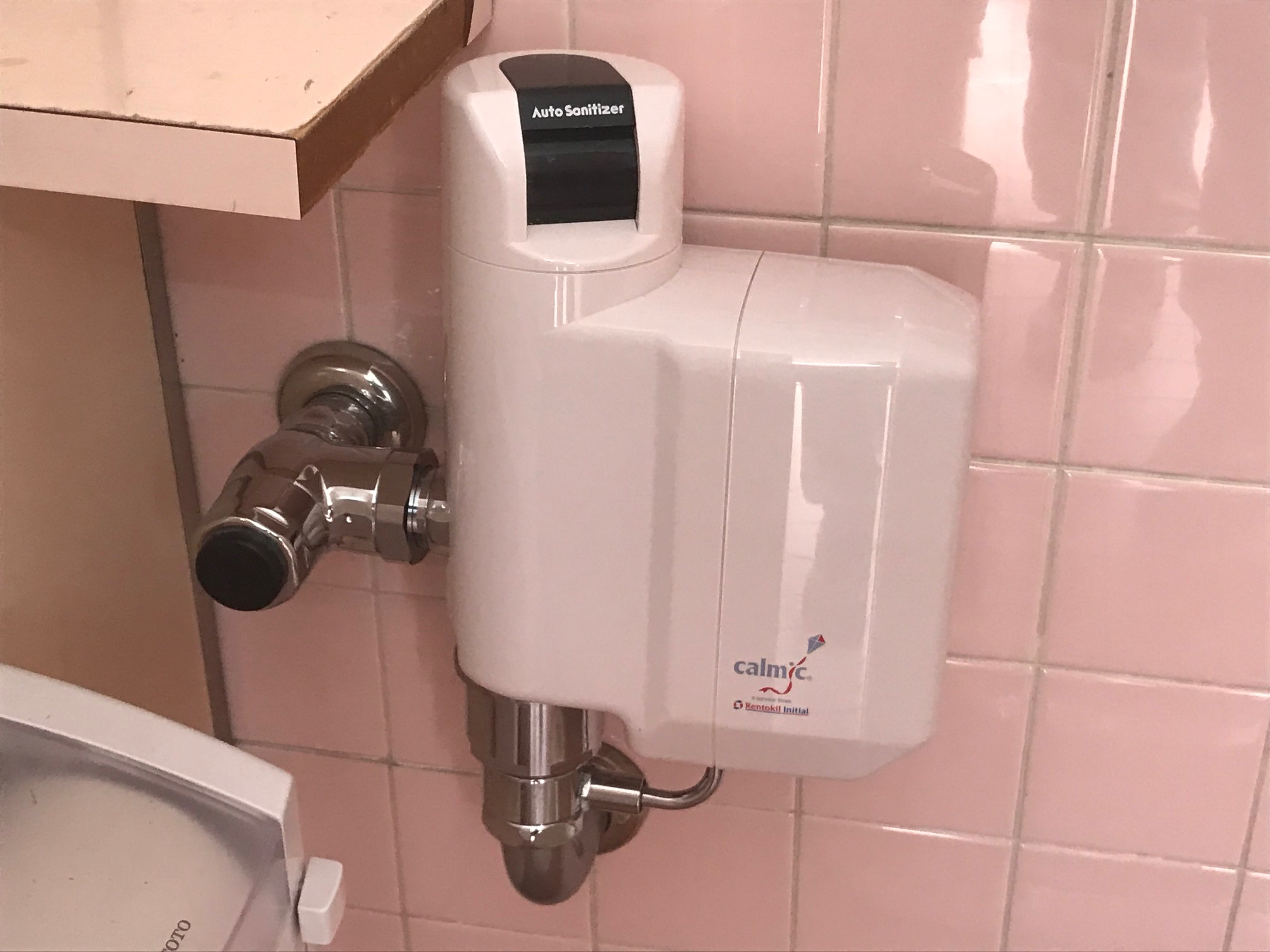 オートサニタイザーMK55